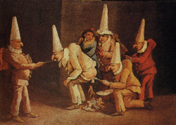 Schilderij van Pulcinella, die een kind baart.